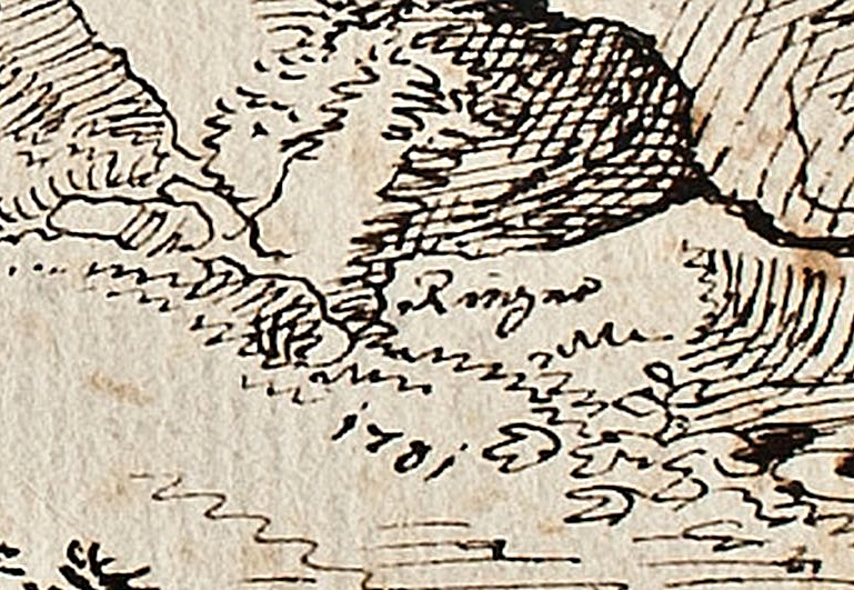 Johann Jakob Rieger: Felsentor mit Wanderern, Signatur